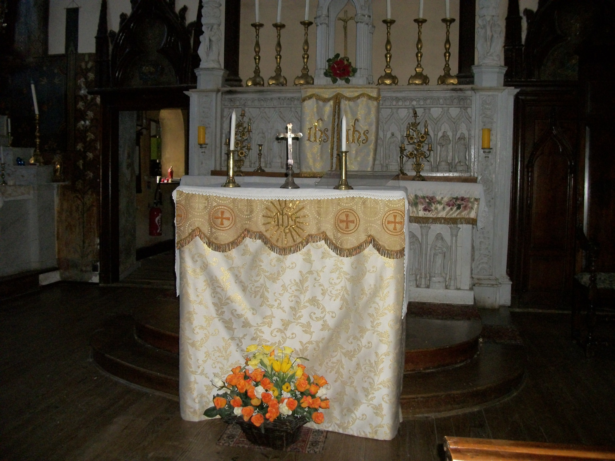 Église Saint-Jean-Baptiste de Nestier